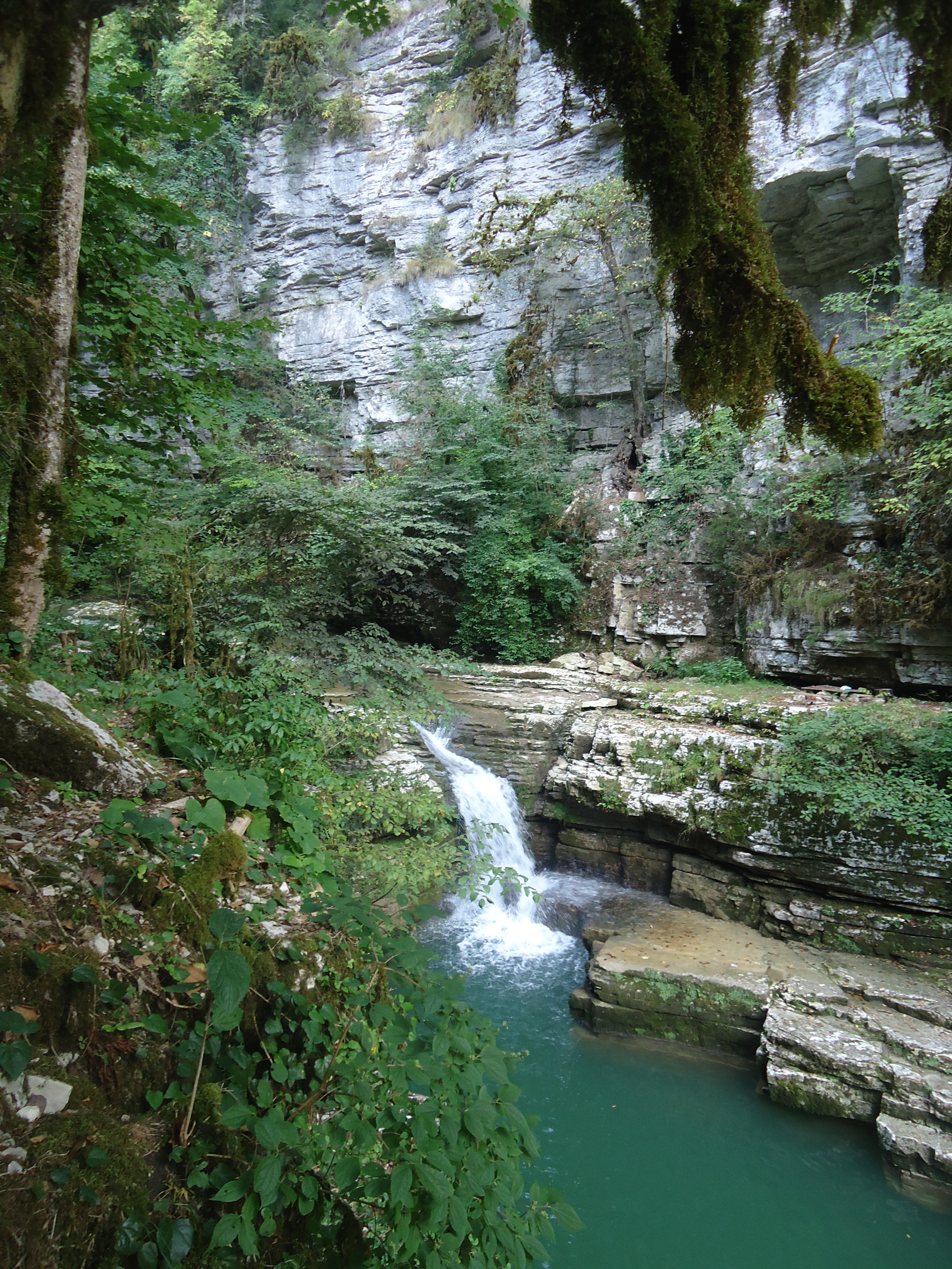 Кудепстинский каньон, Сочи This image is related to the protected area of Russia number 2310328